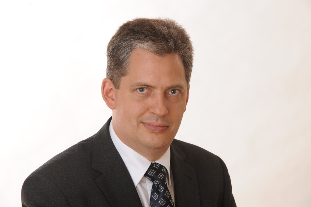 Jiří Dienstbier mladší